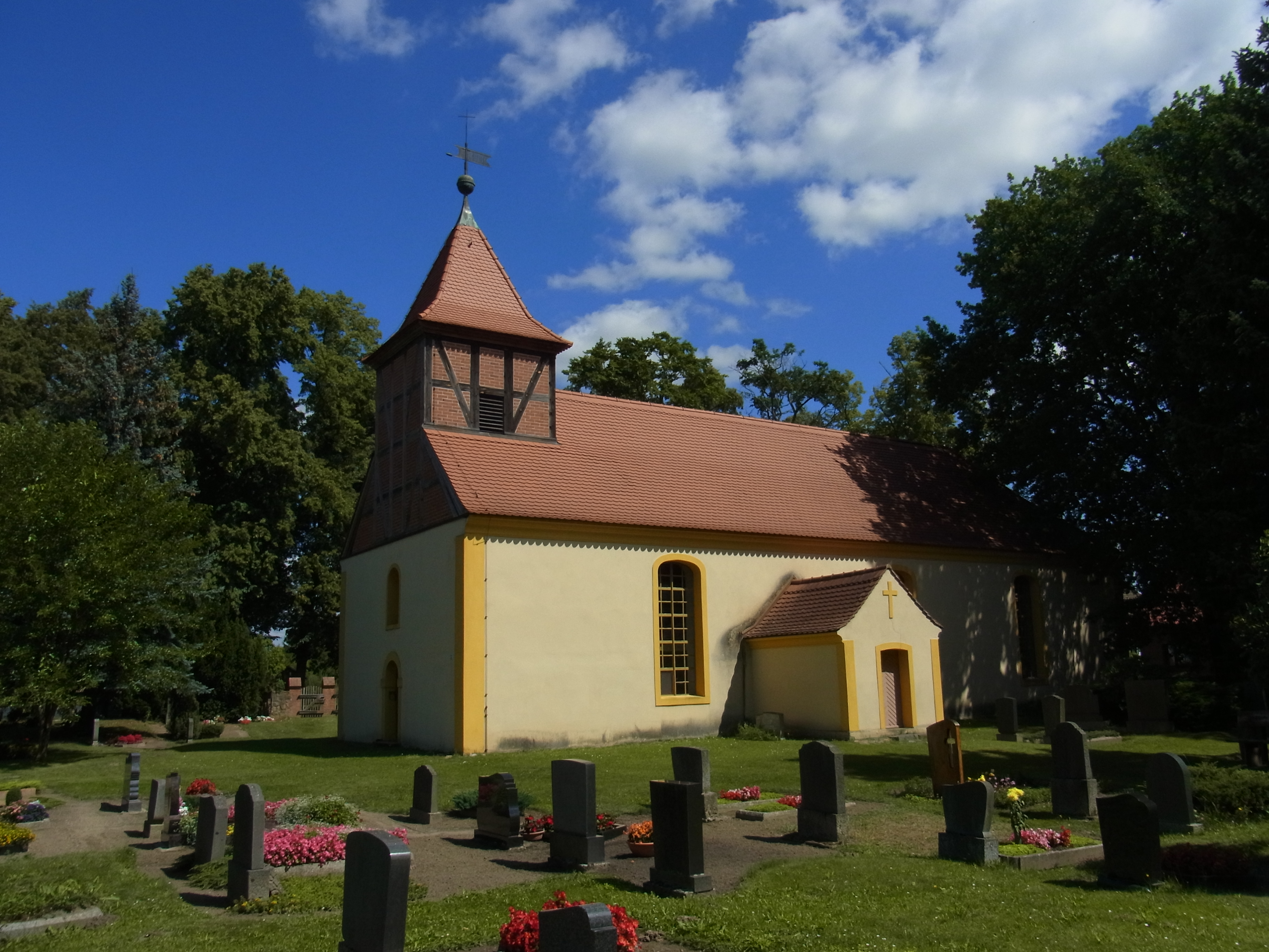 Kirche Ahrensdorf (Rietz-Neuendorf) in Brandenburg. Das Gebäude steht unter Denkmalschutz.